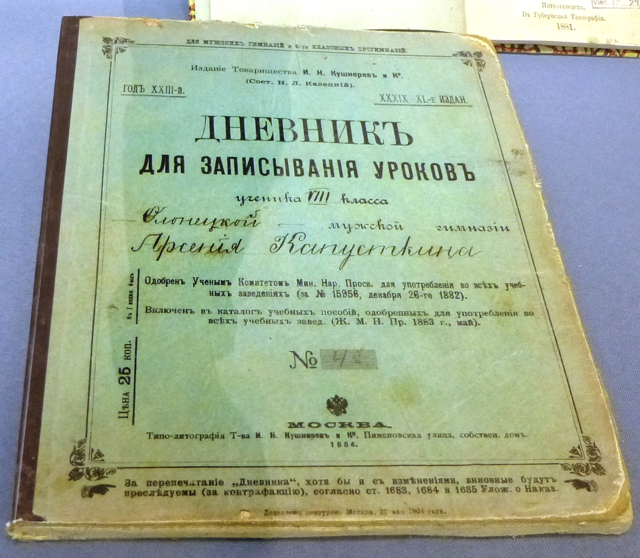 Дневник ученика Олонецкой губернской мужской гимназии.(источник - Национальный музей Республики Карелия)